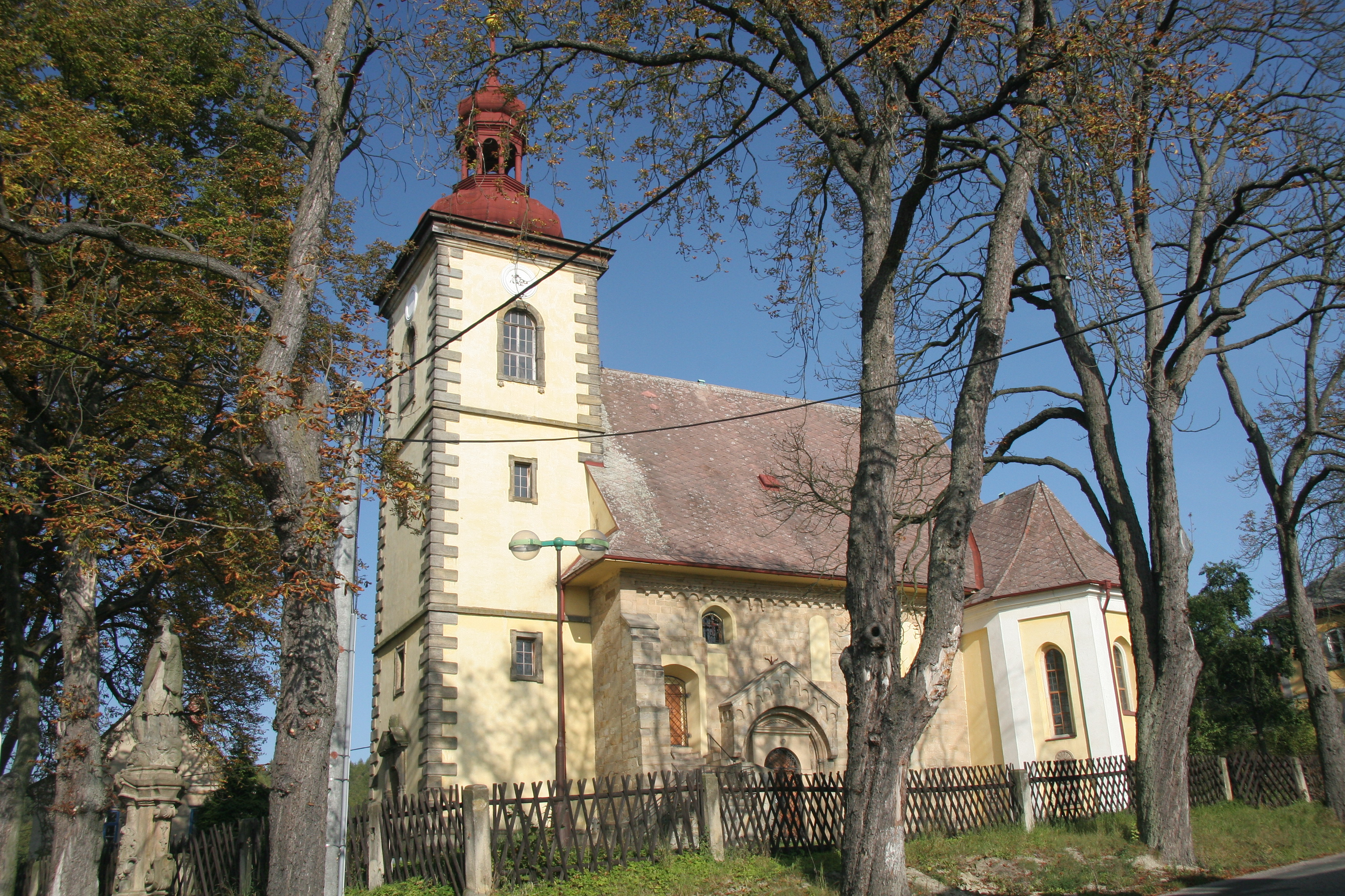 Kostel Sv. Bartoloměje (Lanžov)